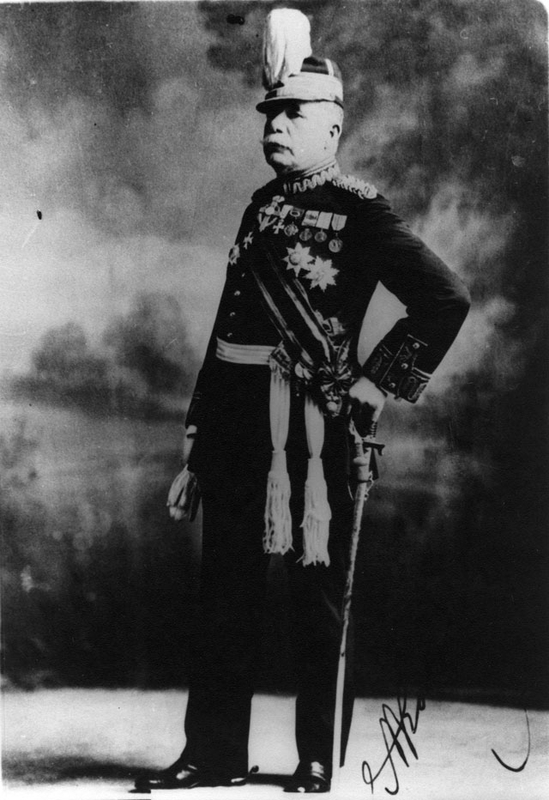 Гръцкият андартски капитан и офицер Александрос Кондулис.